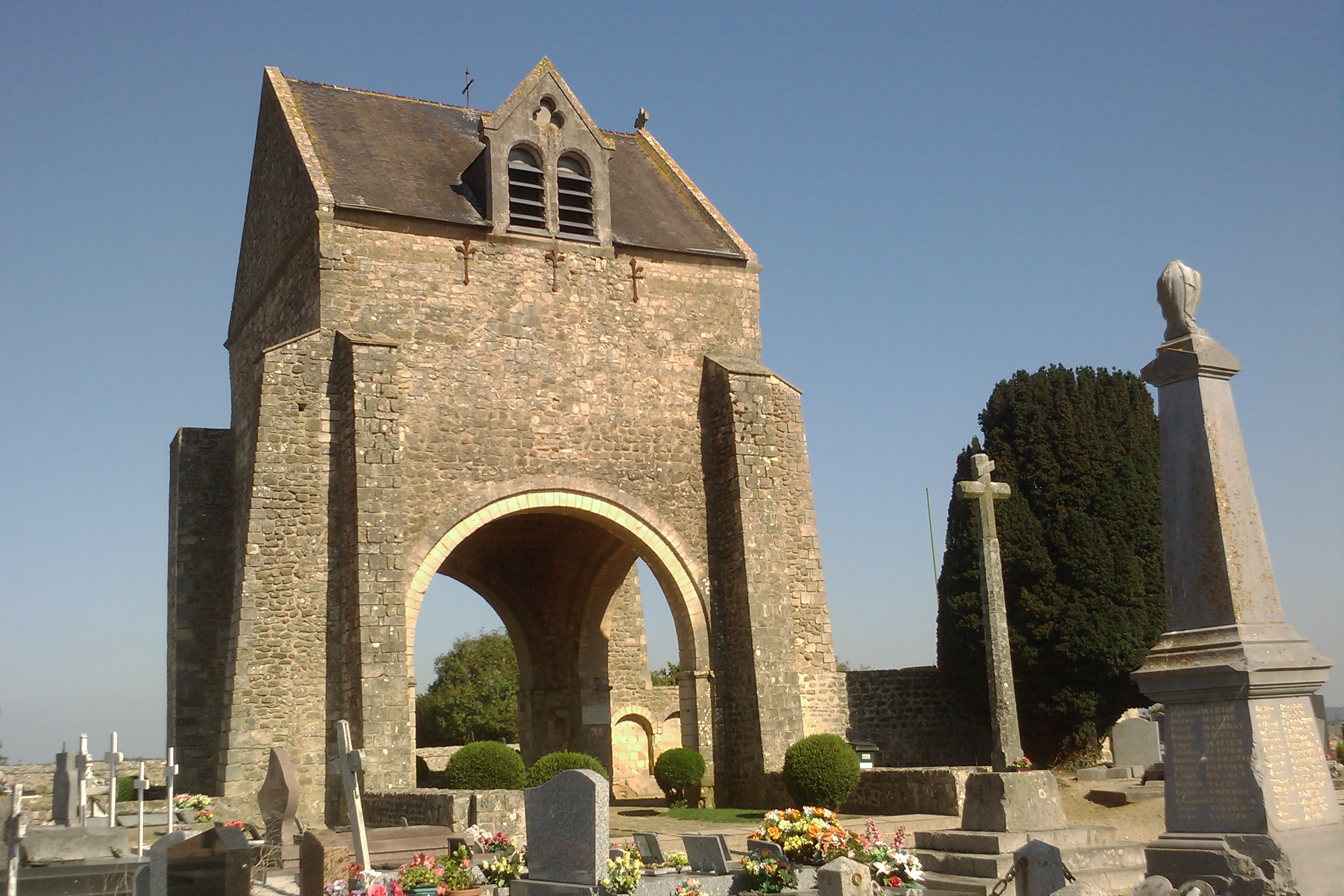 Mémorial Franco-Américain de Graignes, sur les ruines de l'ancienne église